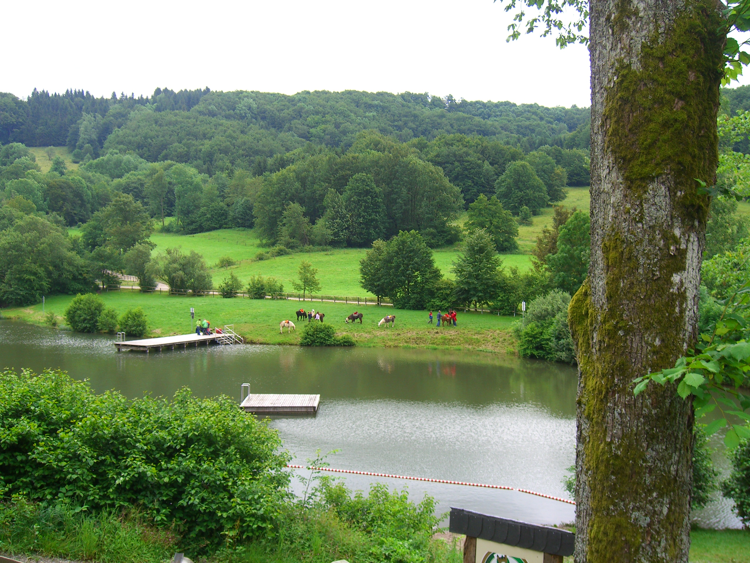 Foto vom Guckaisee im Naturpark Hessische Rhön